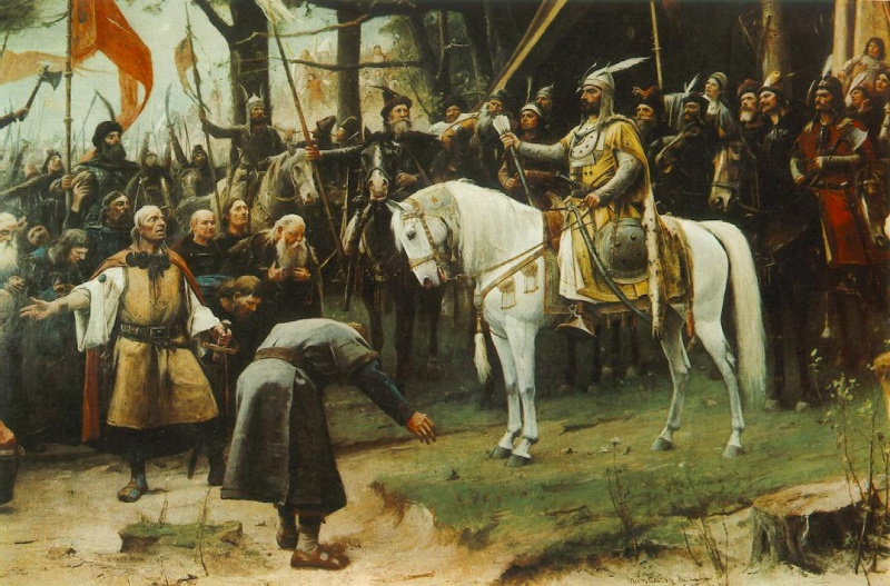 Munkácsy Mihály: Honfoglalás (1893)